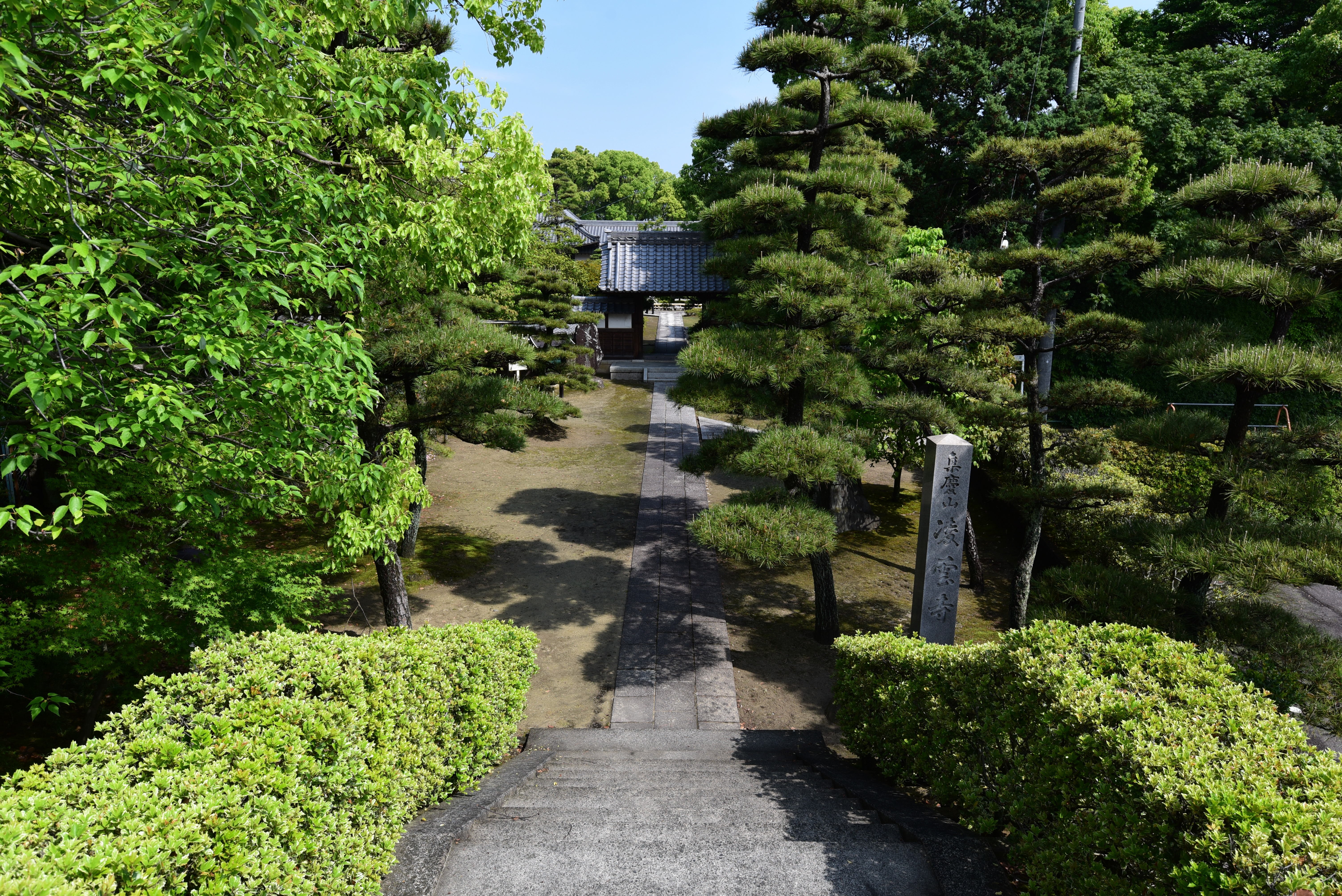 凌雲寺山門